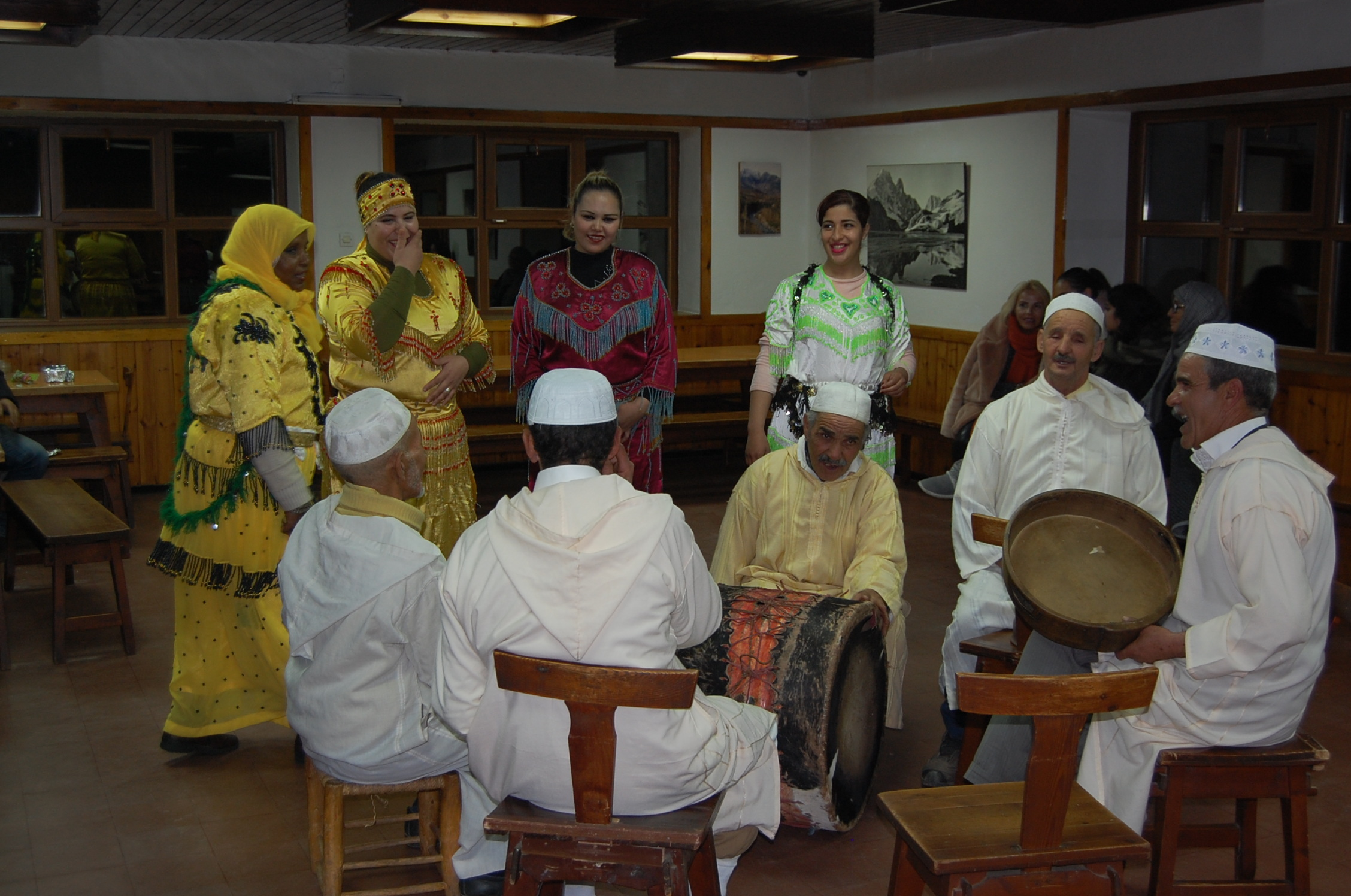 Walon: binde di muzicyins et d' danseuses d' Ahwache (Oucaymeden)